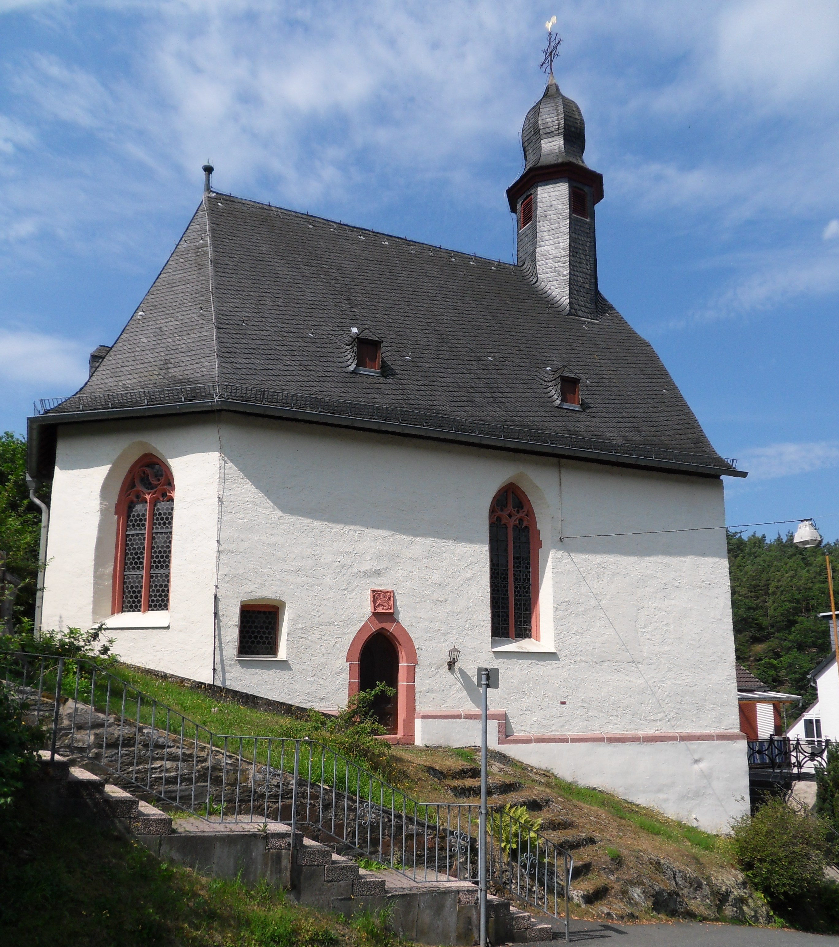 Ehemalige Valentins- oder Burgkapelle in der Burgstraße in Adolfseck, Blick von Nordosten